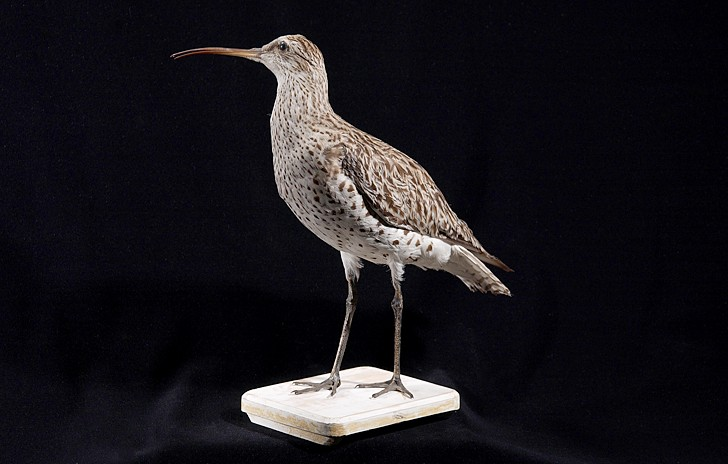 Numenius tenuirostris Vieillot, 1817